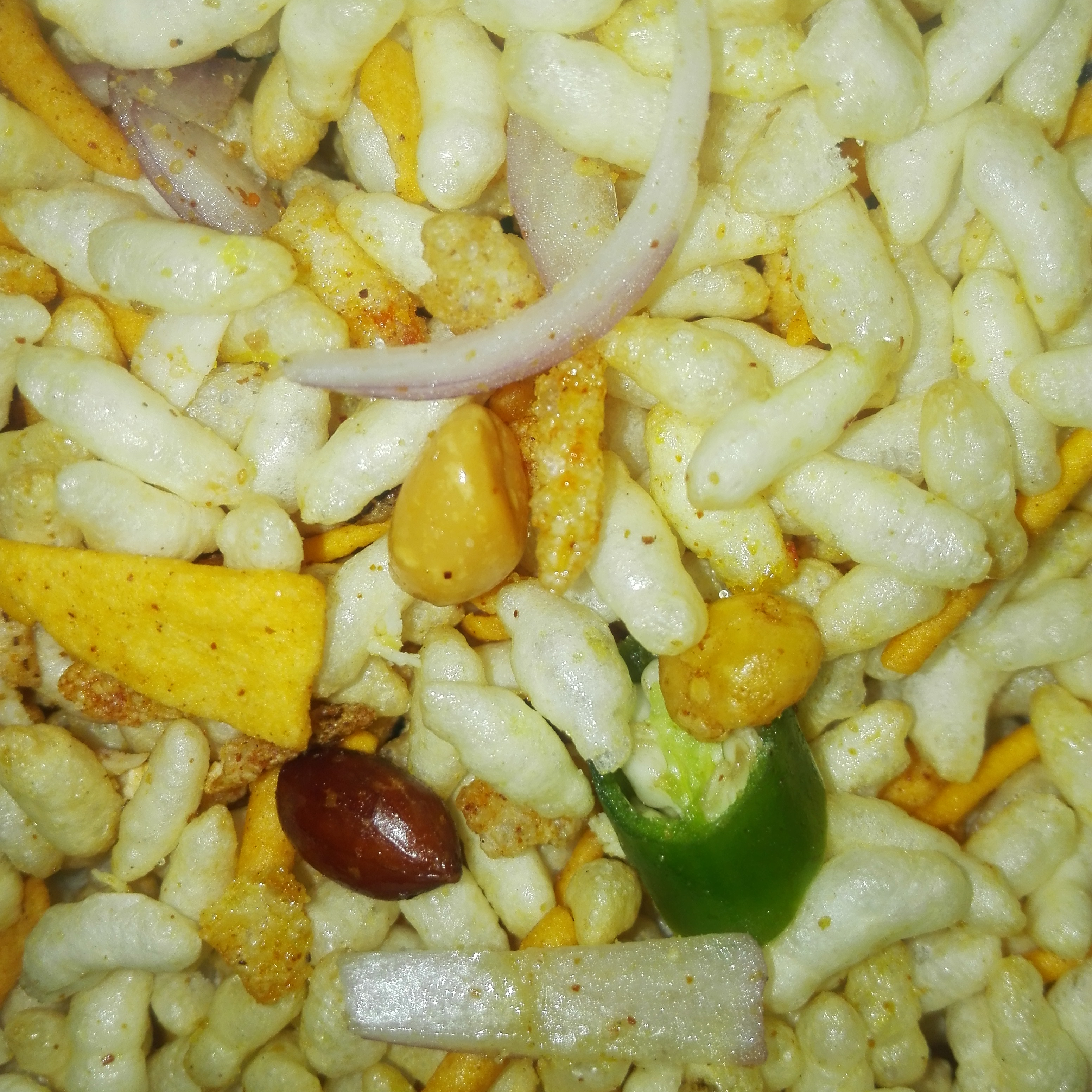 jhal muri